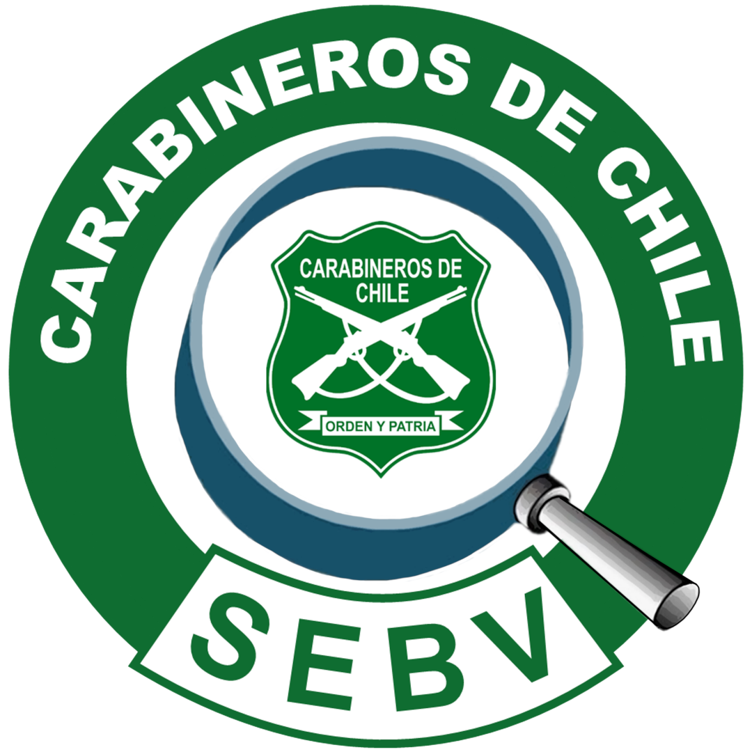 Department of Commissioning and Search for People and Vehicles